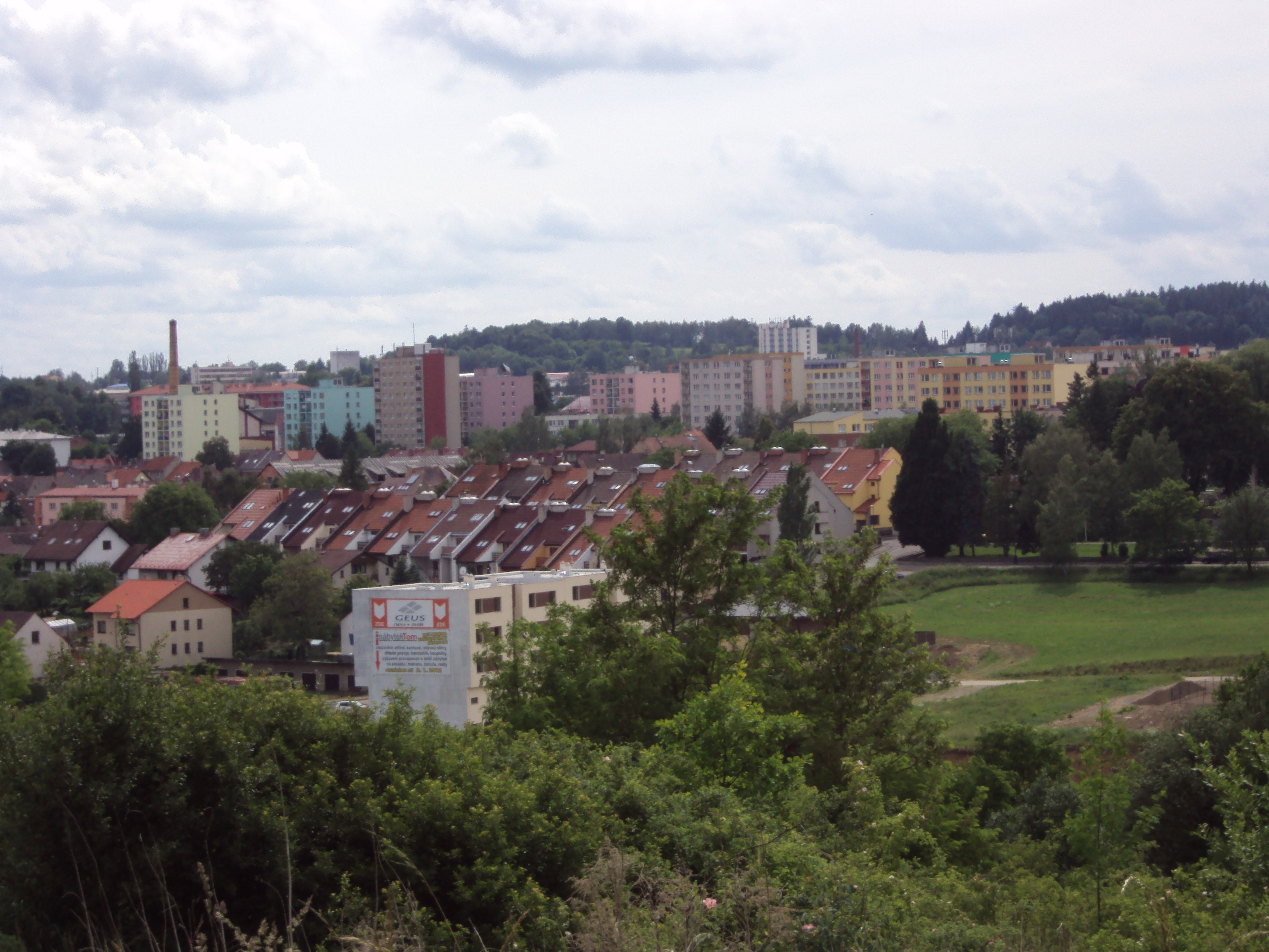 Sídliště